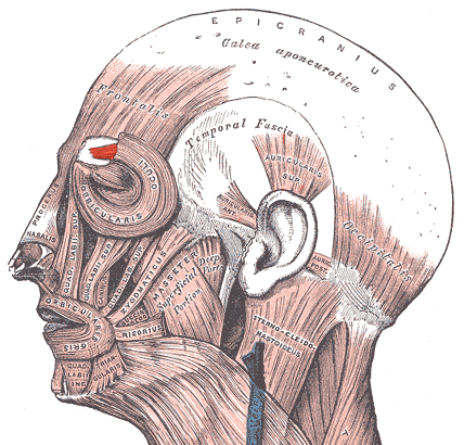 Corrugator supercilii muscle